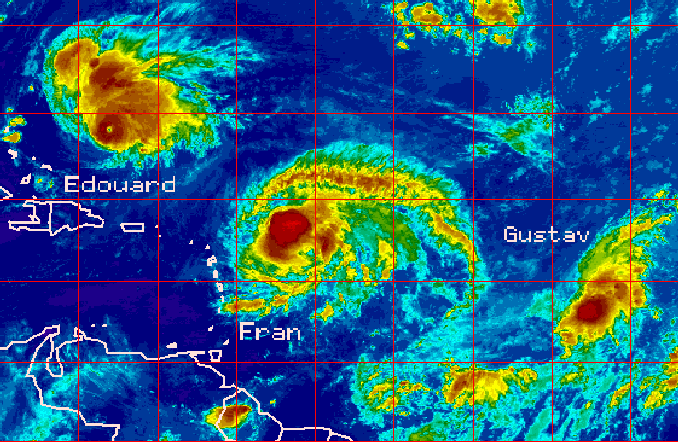 Infra rood satellietbeeld van de NOAA